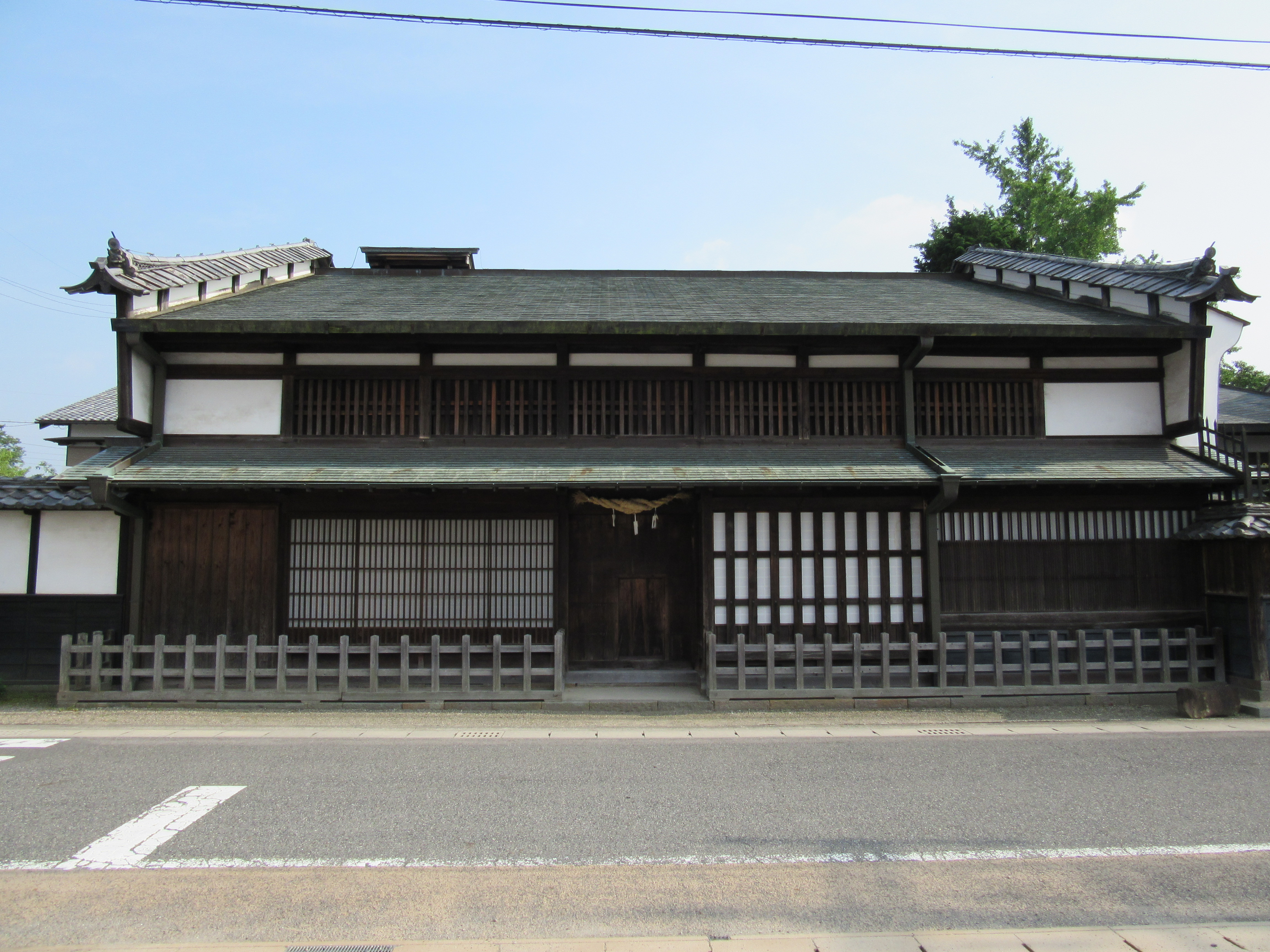 岐阜県美濃加茂市にある旧太田脇本陣林家住宅